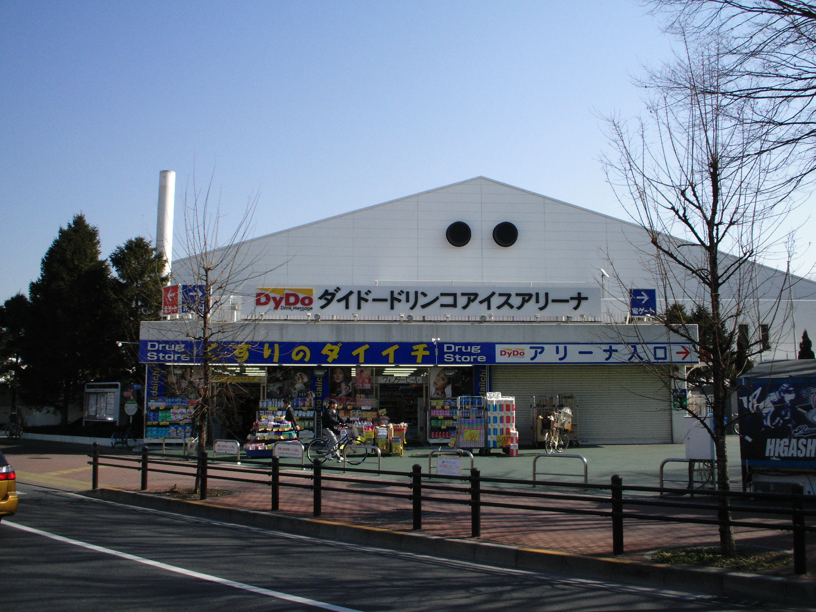 DyDo Drinco Ice Arena